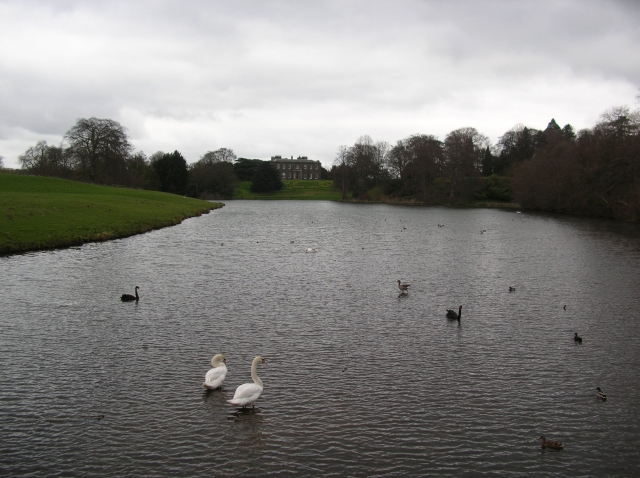 Copgrove Hall, Copgrove